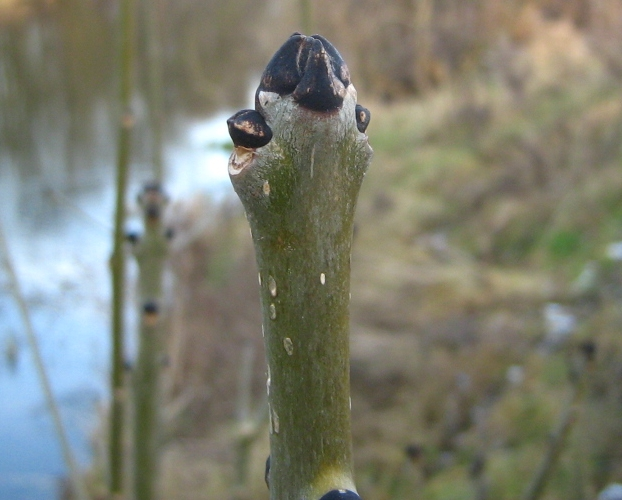 Knospen der Gemeinen Esche - Fraxinus excelsior, fotographiert an der Havel in Oranienburg (Brandenburg)